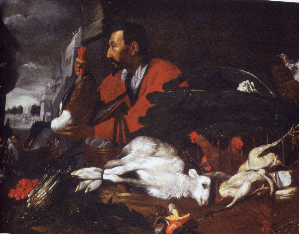 Market scene